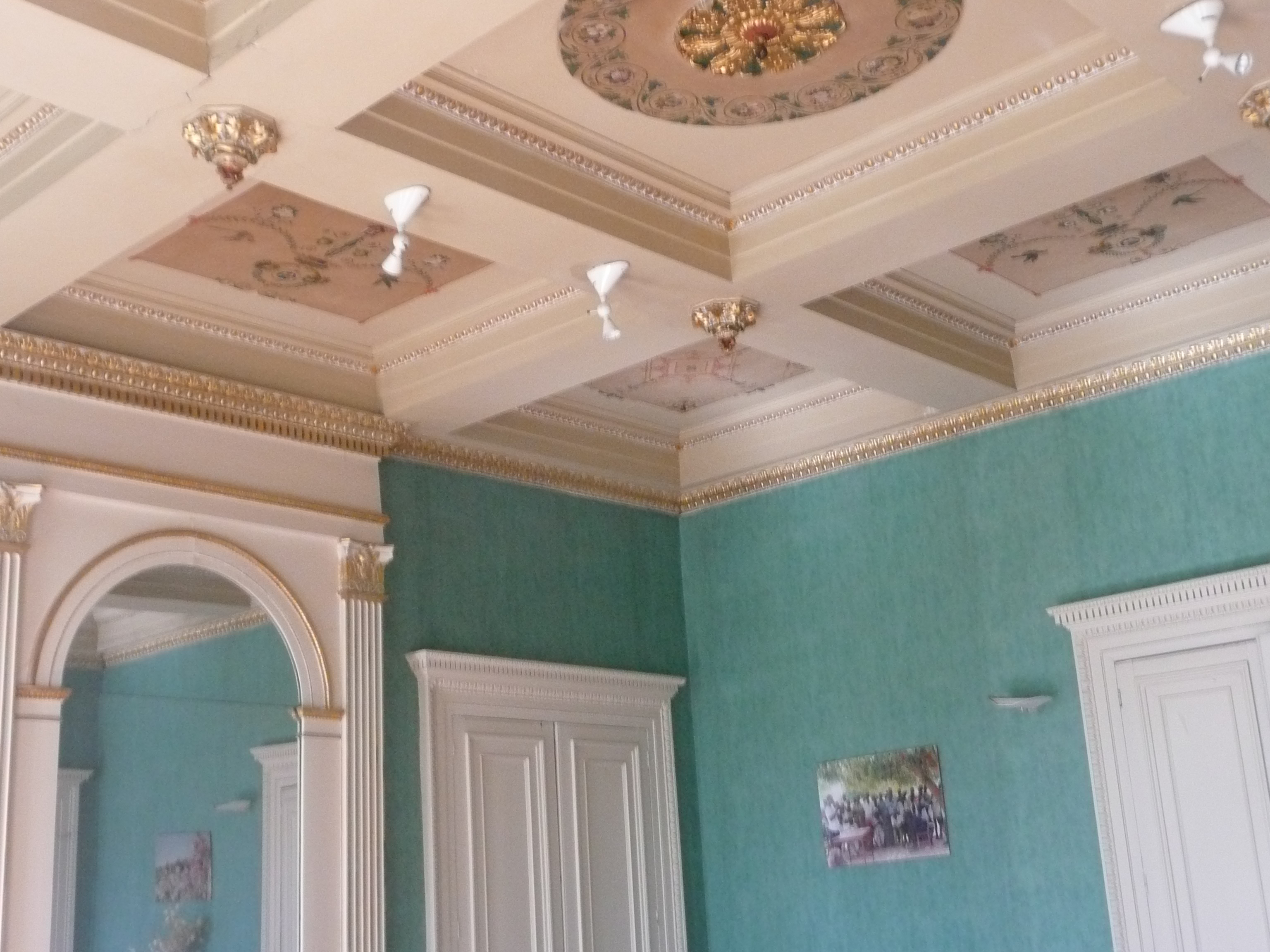 Maison annexe de la villa Ingouville à Lyon, siège de l'AMM (association médicale missionnaire) ancienne léproserie connue sous le nom de clinique du Saint-Rédempteur